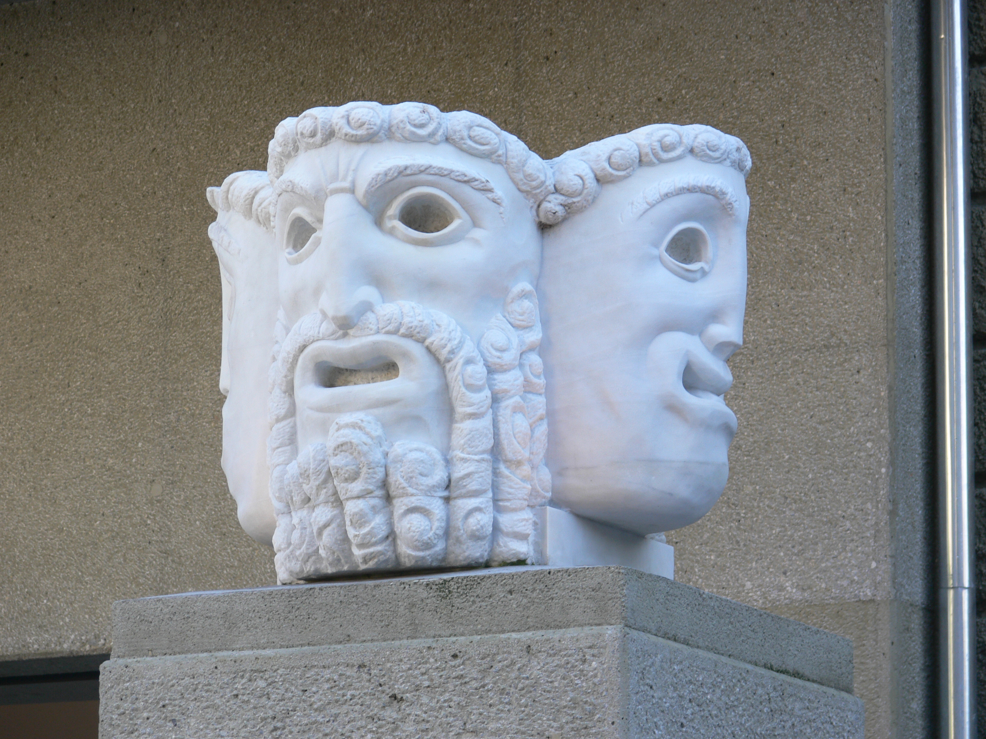 Salzburg, Festspielhauskomplex, Haus für Mozart (Kleines Festspielhaus) Skulptur "Masken" vor dem Haus